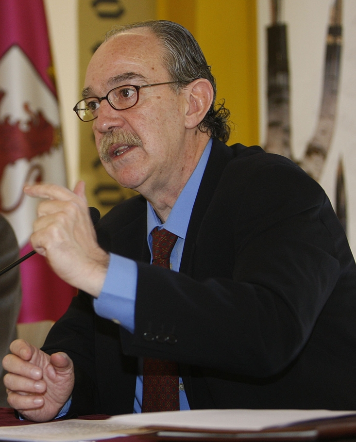 Francisco García Pérez.